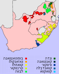 בנטוסטן